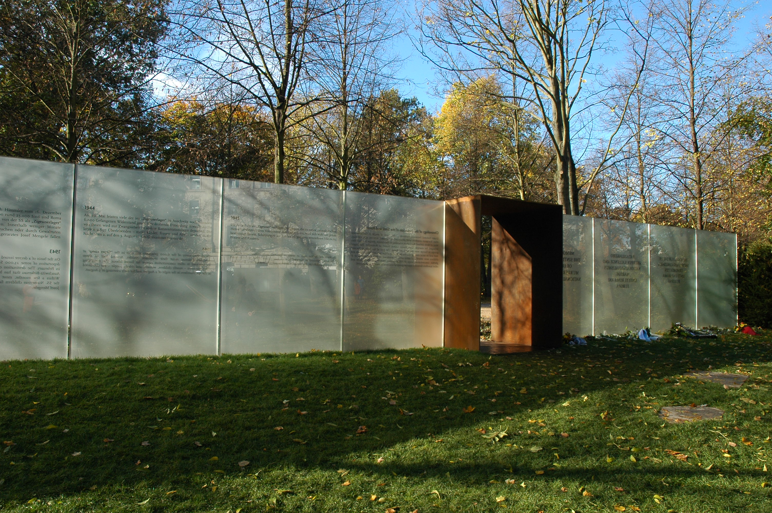 Denkmal für die im Nationalsozialismus ermordeten Sinti und Roma Europas, Eingang von innen